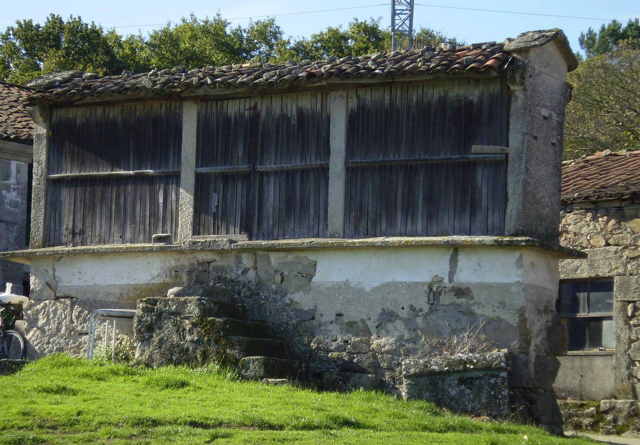 Hórreo de tipo mahía, de tres claros, sobre soleira edificada ad hoc. Escaleira lateral de acceso. Ubicado no lugar de Senande (Antas de Ulla)